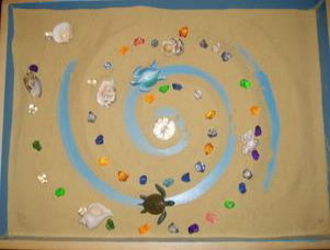 Пример композиции, созданной во время сеанса песочной терапии.